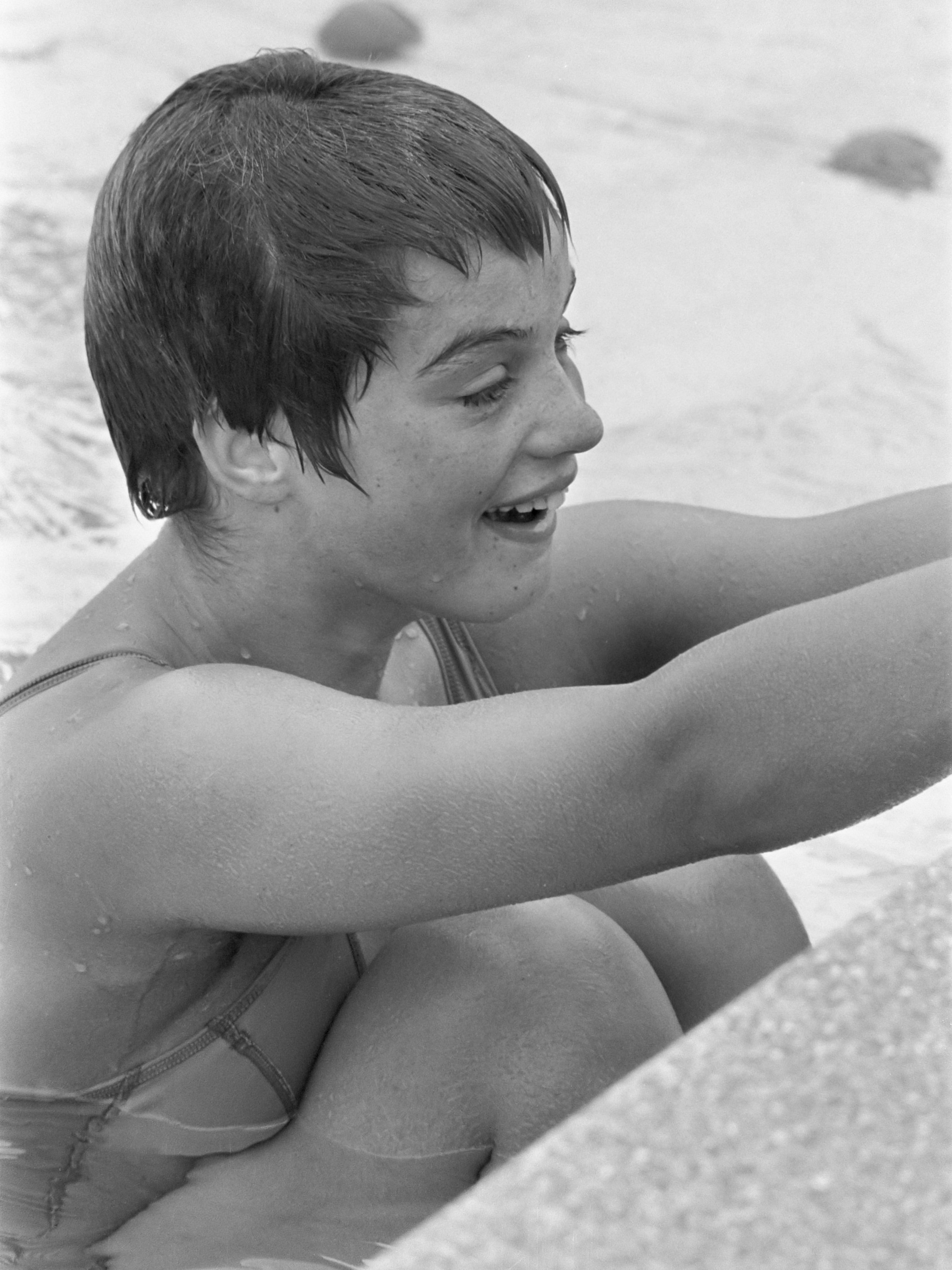 Nederlandse zwemploeg voor Barcelona traint in Den Homme(l ?), Utrecht 19 augustus 1970